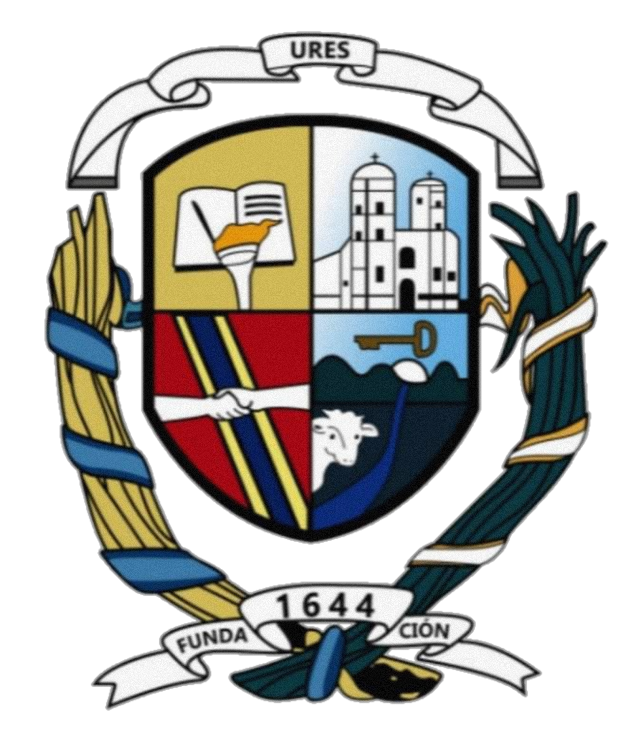 Escudo del municipio sonorense.